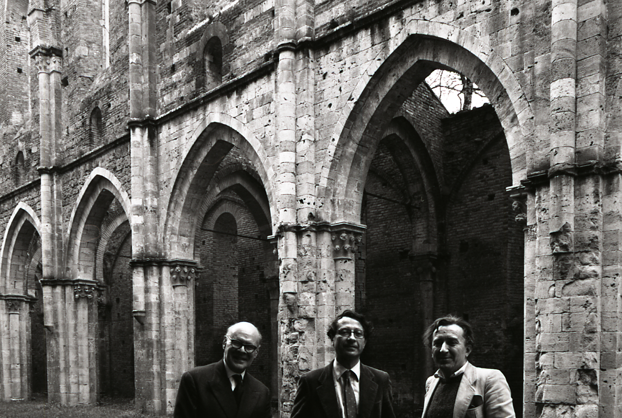 Servizio fotografico : Chiusdino, 1980 / Paolo Monti. - Strisce: 3, Fotogrammi complessivi: 18 : Negativo b/n, gelatina bromuro d'argento/ pellicola ; 35 mm. - ((Sul portanegativi: N[I]K[MA]T-EL FP4 iscrizione didascalica e documentaria manoscritta a pennarello nero "San Galgano 20-37". - All'interno del portanegativi: la serie è anche identificata da una linea orizzontale a pennarello rosso che separa la suddetta serie dalla precedente di soggetto diverso e da un'iscrizione didascalica manoscritta a pennarello nero ("Abbazia di S. Galgano") in corrispondenza dei fotogrammi che compongono la serie. - Una striscia adesva in carta bianca tiene uniti ordi superiori e inferiori dei fotogrammi nn. 28-29 e 34-35. - N.B. Fotogrammi nn. 22 e 23 = Ritratti. - Occasione: Documentazione del centro storico. - Fonte: Agenda di Paolo Monti: Nikon Leika 3001-/ Monti 1978 (1978-1982), presso Archivio Paolo Monti